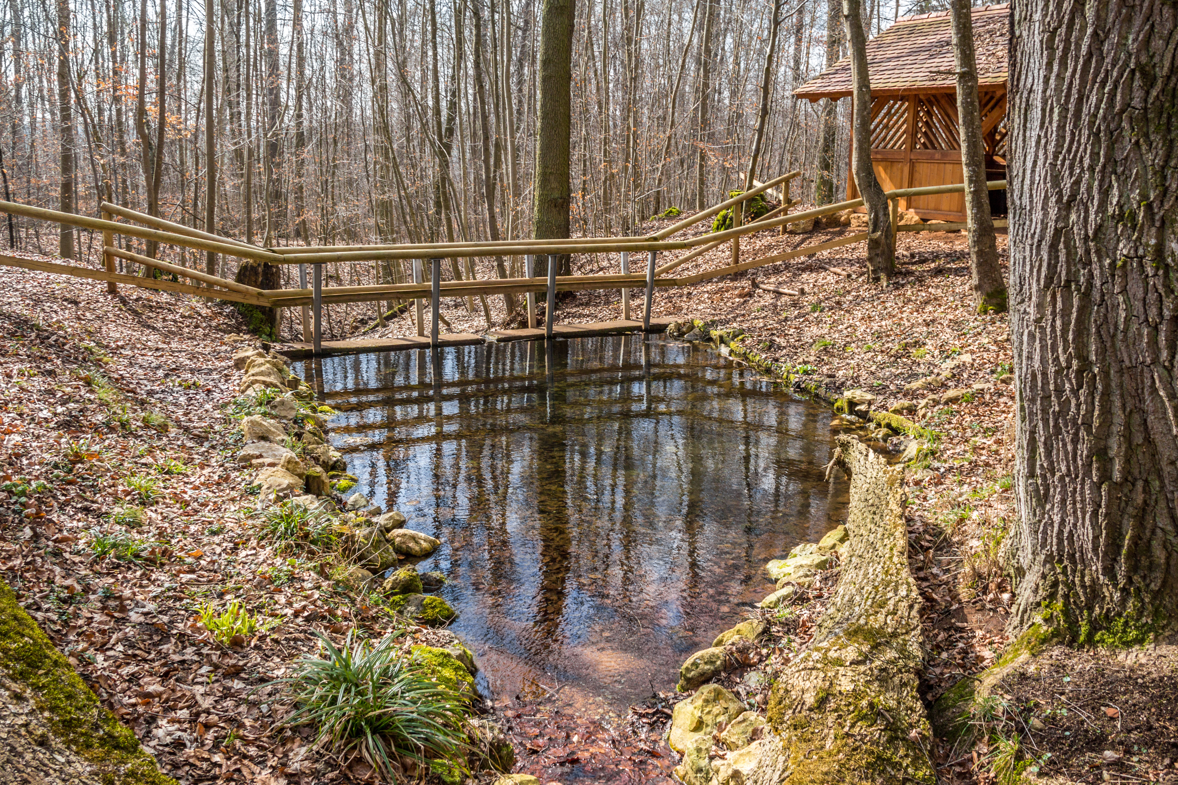 Sieben Quellen, Heidenheim